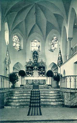 Herz Jesu Kirche Handrup 1927 am Tag der Weihe